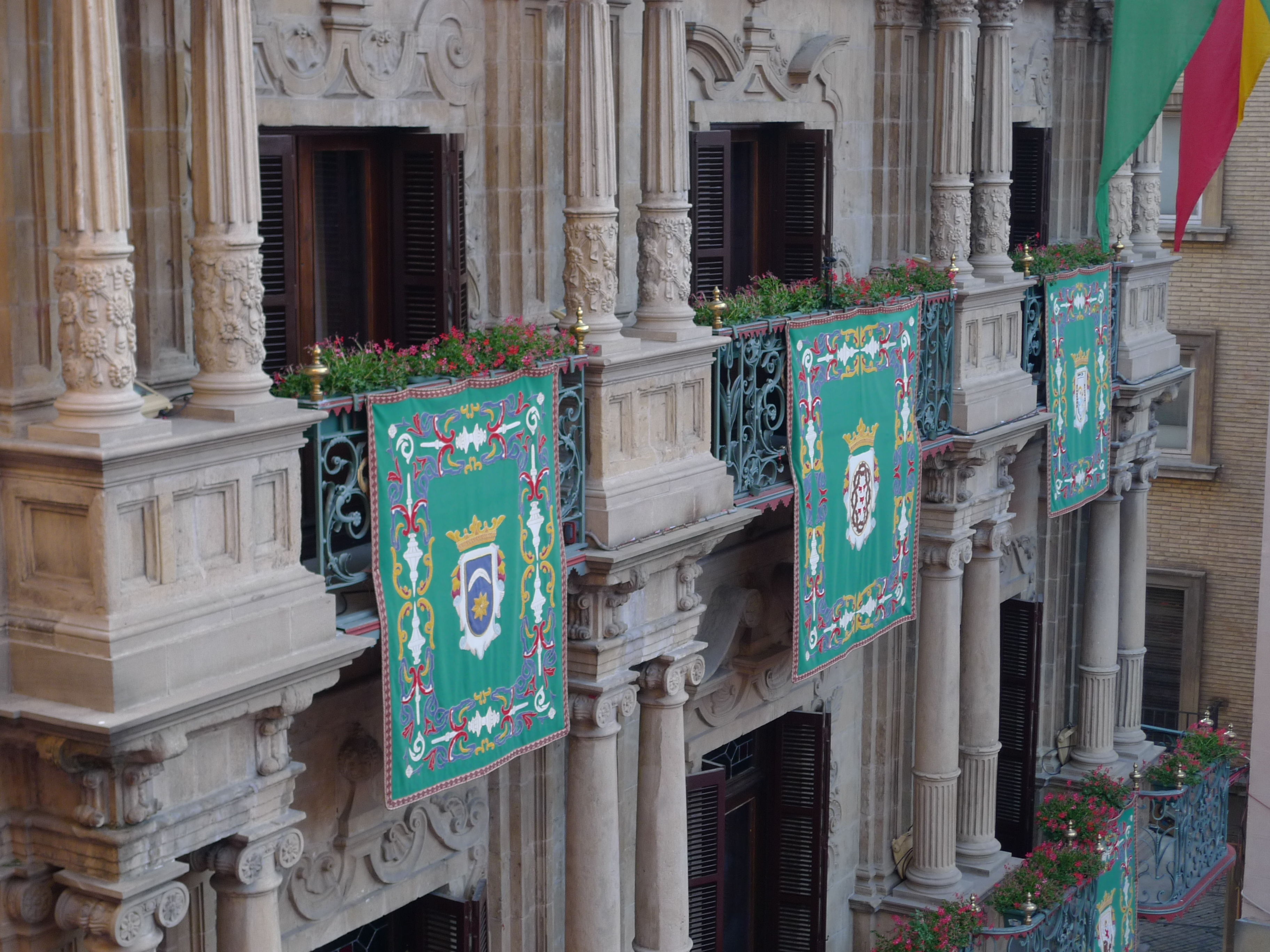 sanfermin 2009, pamplona, spain